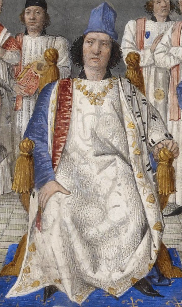 Le roi Louis XI préside l'un des chapitres de l'ordre de Saint-Michel.